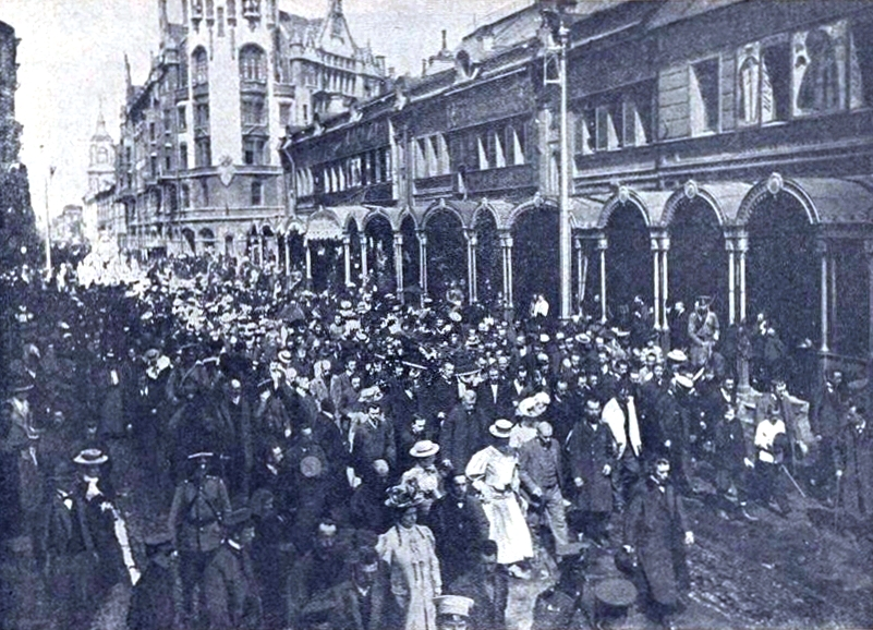 Похороны композитора Н. А. Римского-Корсакова. Похоронная процессия на Вознесенском проспекте (пересечение с Садовой).